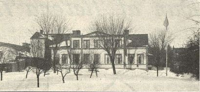 Uppsala Hemskola, arkitekt Theodor Kellgren